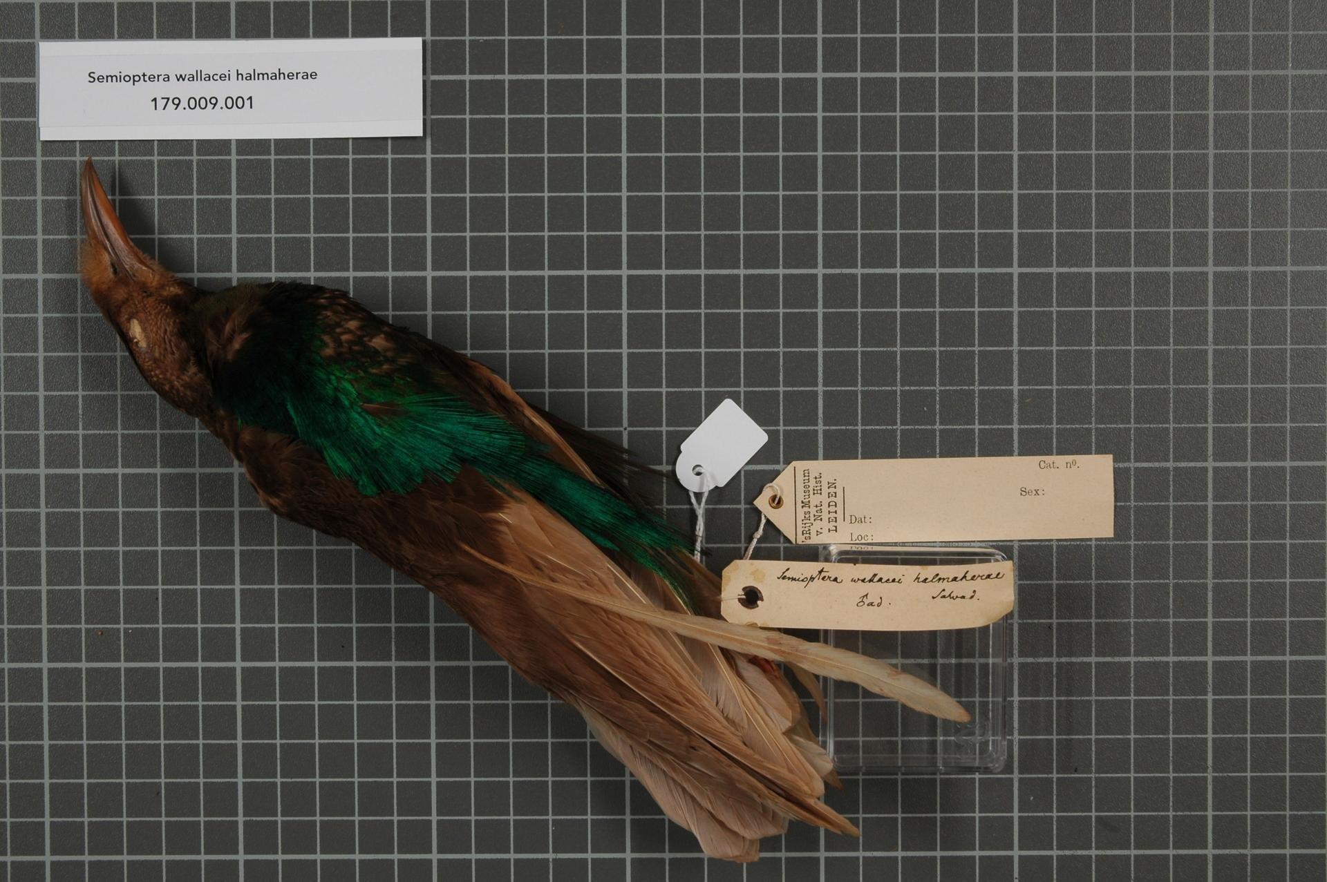 Semioptera wallacei halmaherae Salvadori, 1881